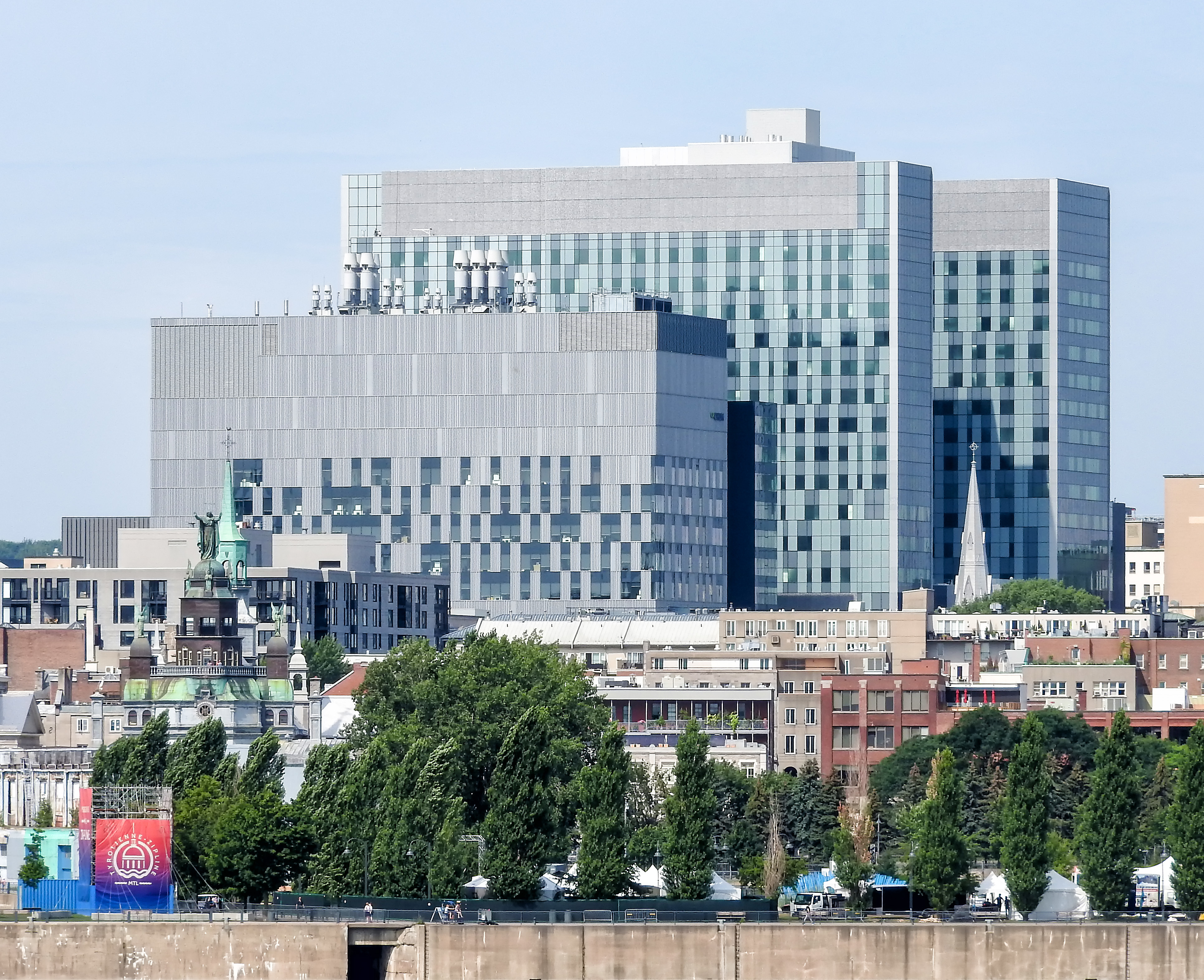 Montréal 364